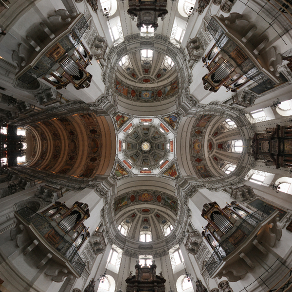 Stereographische Projektion der Vierung des Salzburger Doms